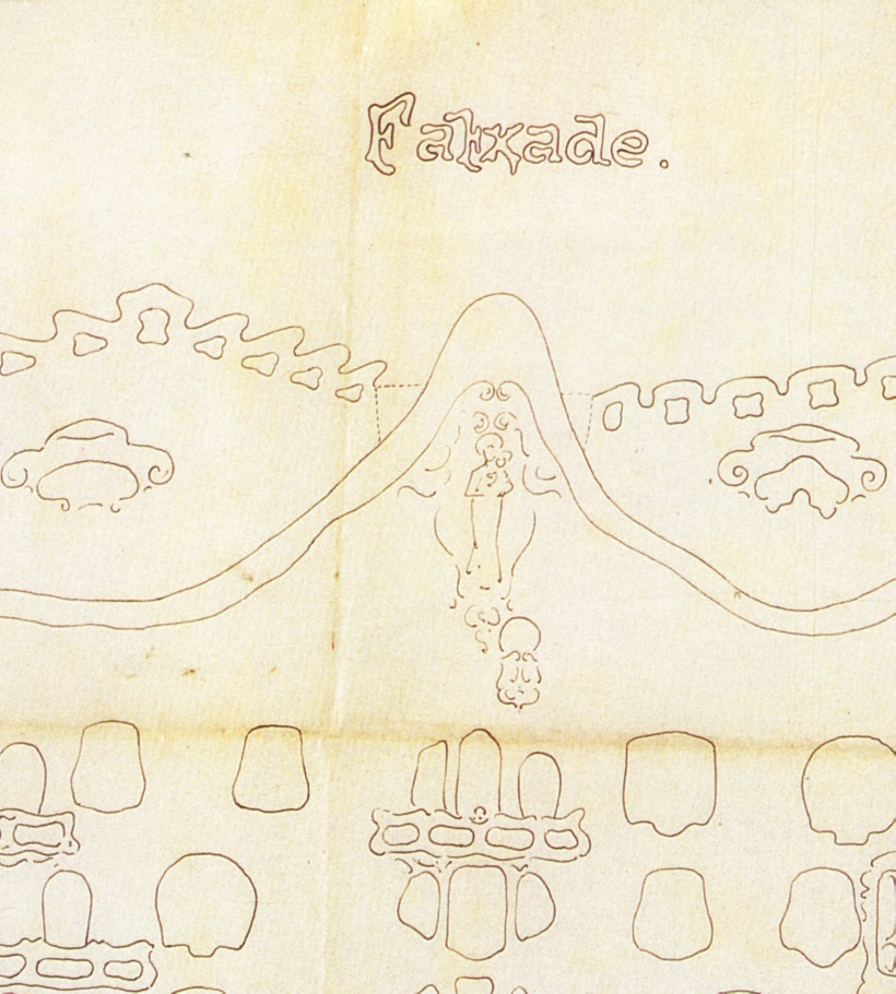 Fragmento del alzado de la Casa Milà con el proyecto escultórico de la Virgen del Rosario, de Antoni Gaudí.